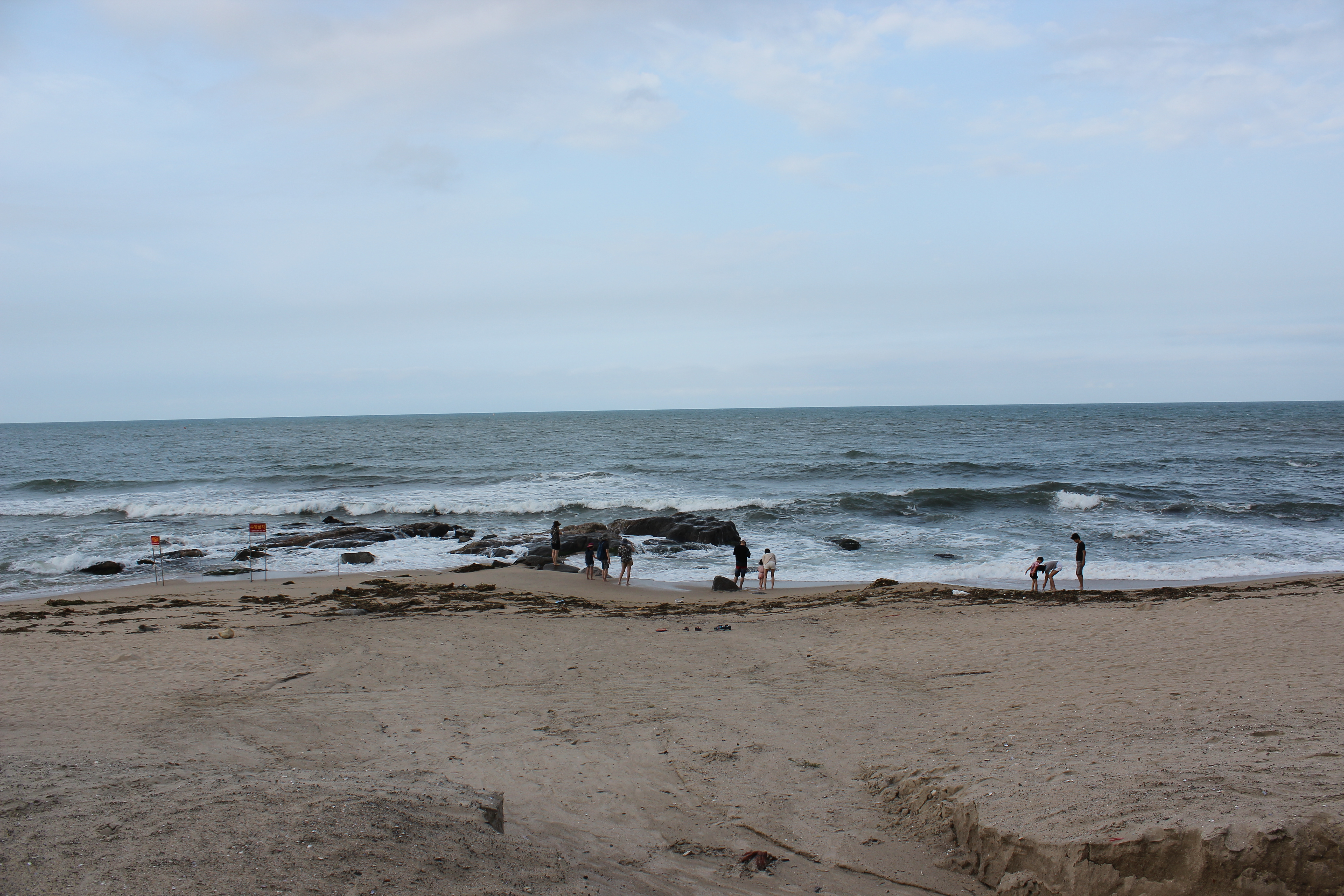 강원도 강릉시 경포해수욕장